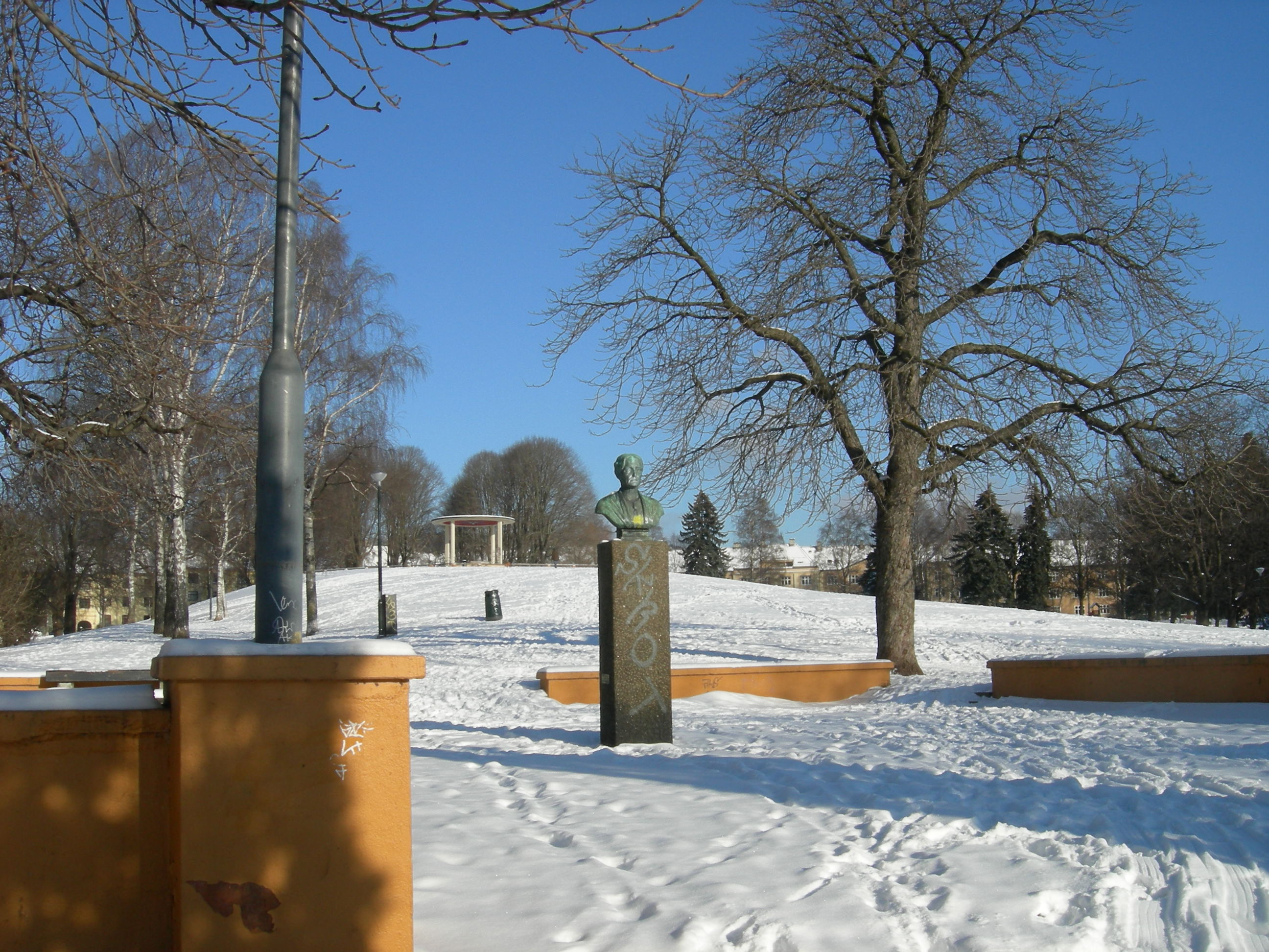 Torshovparken med bysten av Fernanda Nissen